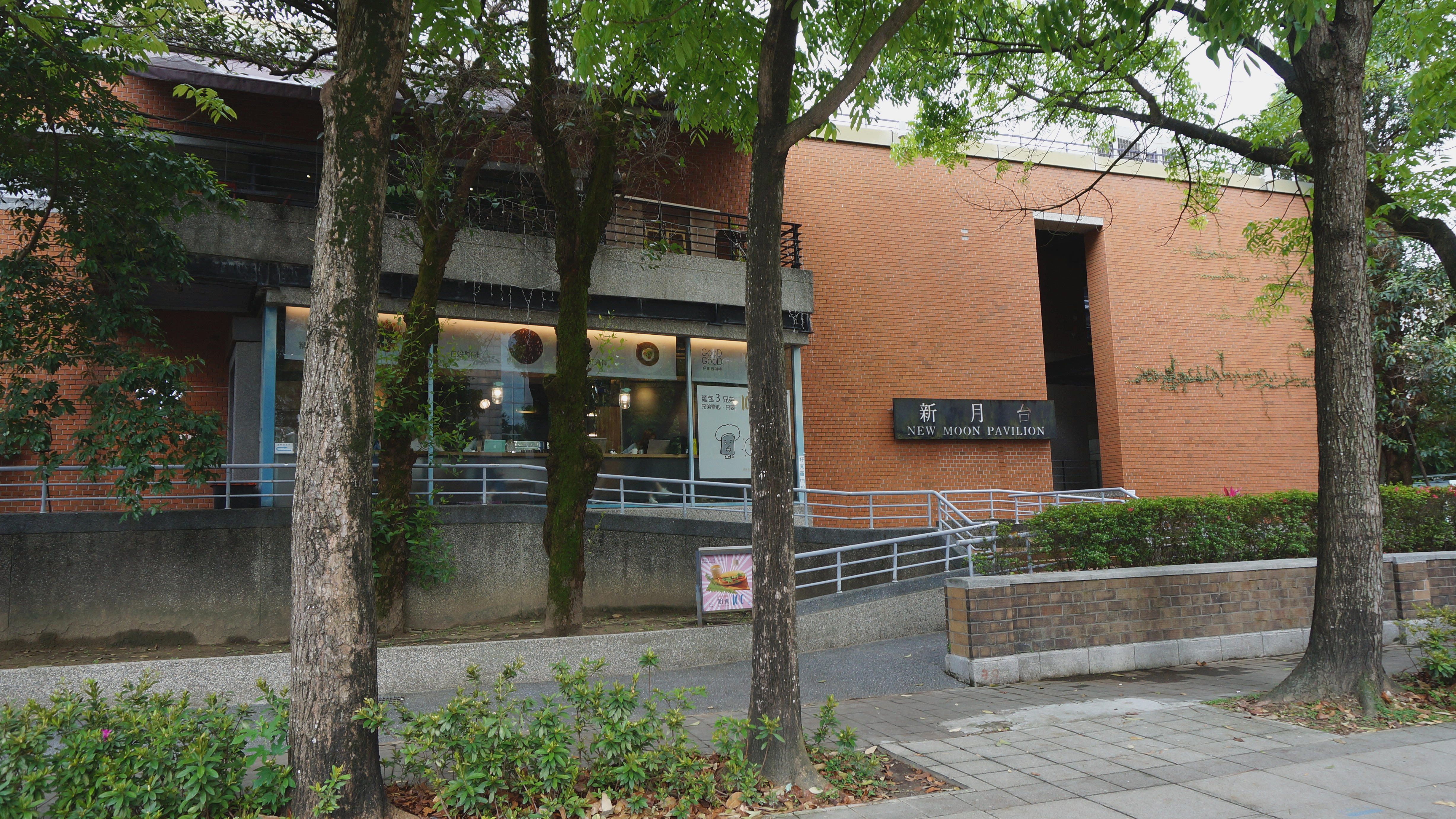 中文（台灣）: 國立臺灣大學新月台新生南路側。